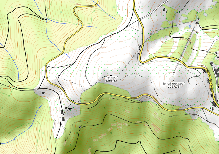 carte réalisée sur umap This map may be incomplete, and may contain errors. Don't rely solely on it for navigation.